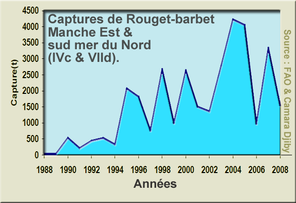 Capture de Rouget barbet en Manche-Est et sud mer du Nord (IVc & VIId). D'après données FAO, utilisées dans un travail de Camara Djiby intitulé" Evaluation préliminaire de stock de rouget barbet de roche (Mullus surmuletus) en Manche-sud mer du Nord" (Mémoire de fin d’études Pour l’obtention du Master Sciences Agronomiques et Agroalimentaires Spécialité Sciences Halieutiques et Aquacoles), soutenu 2009-11-10